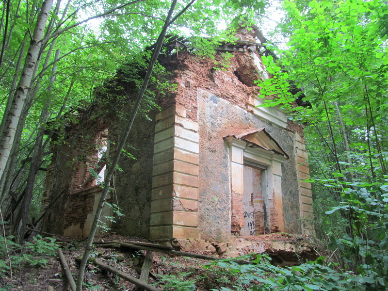 Манькавічы. Рэшткі капліцы-пахавальні Друцкіх-Любецкіх